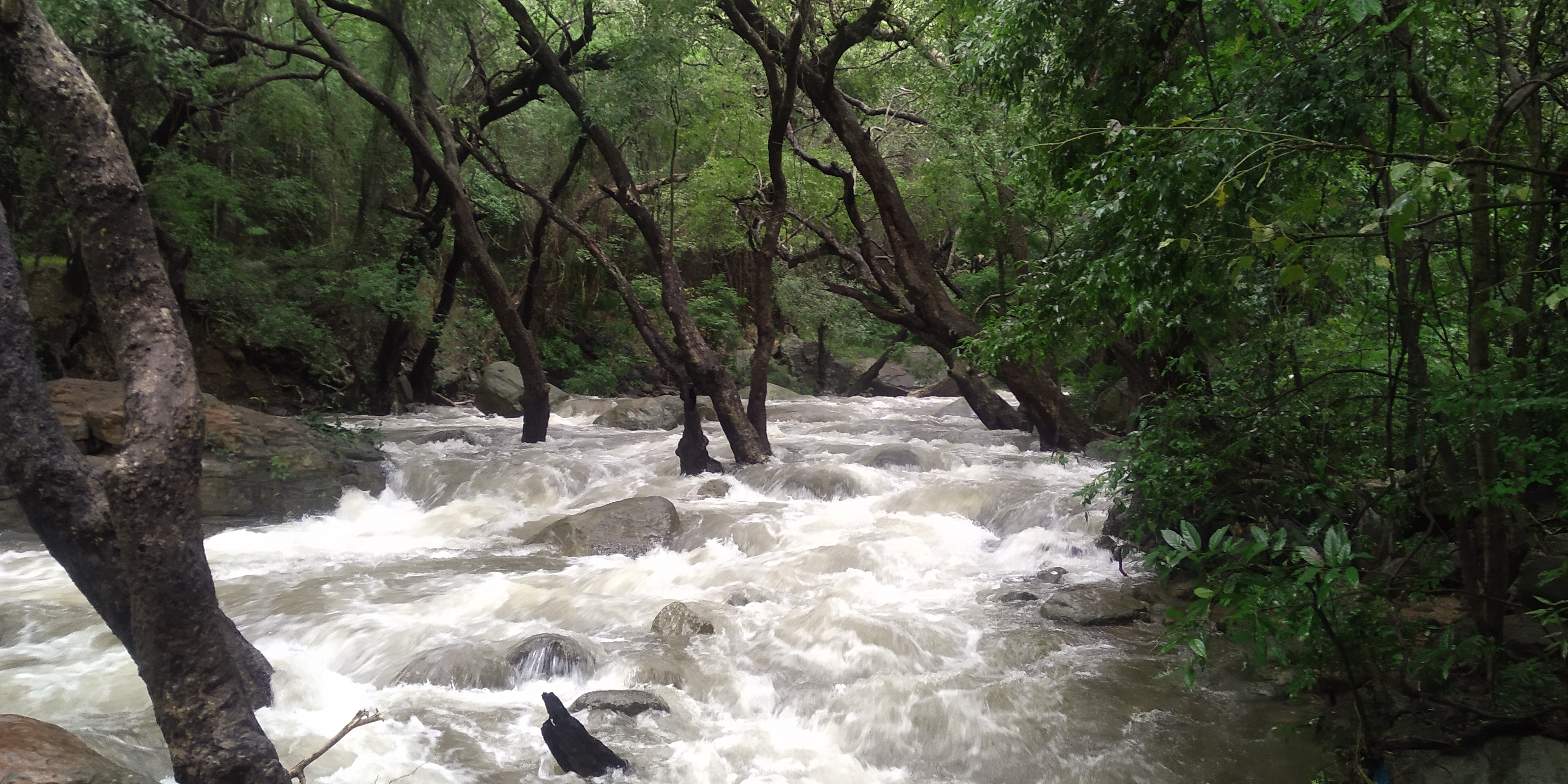 At 2019